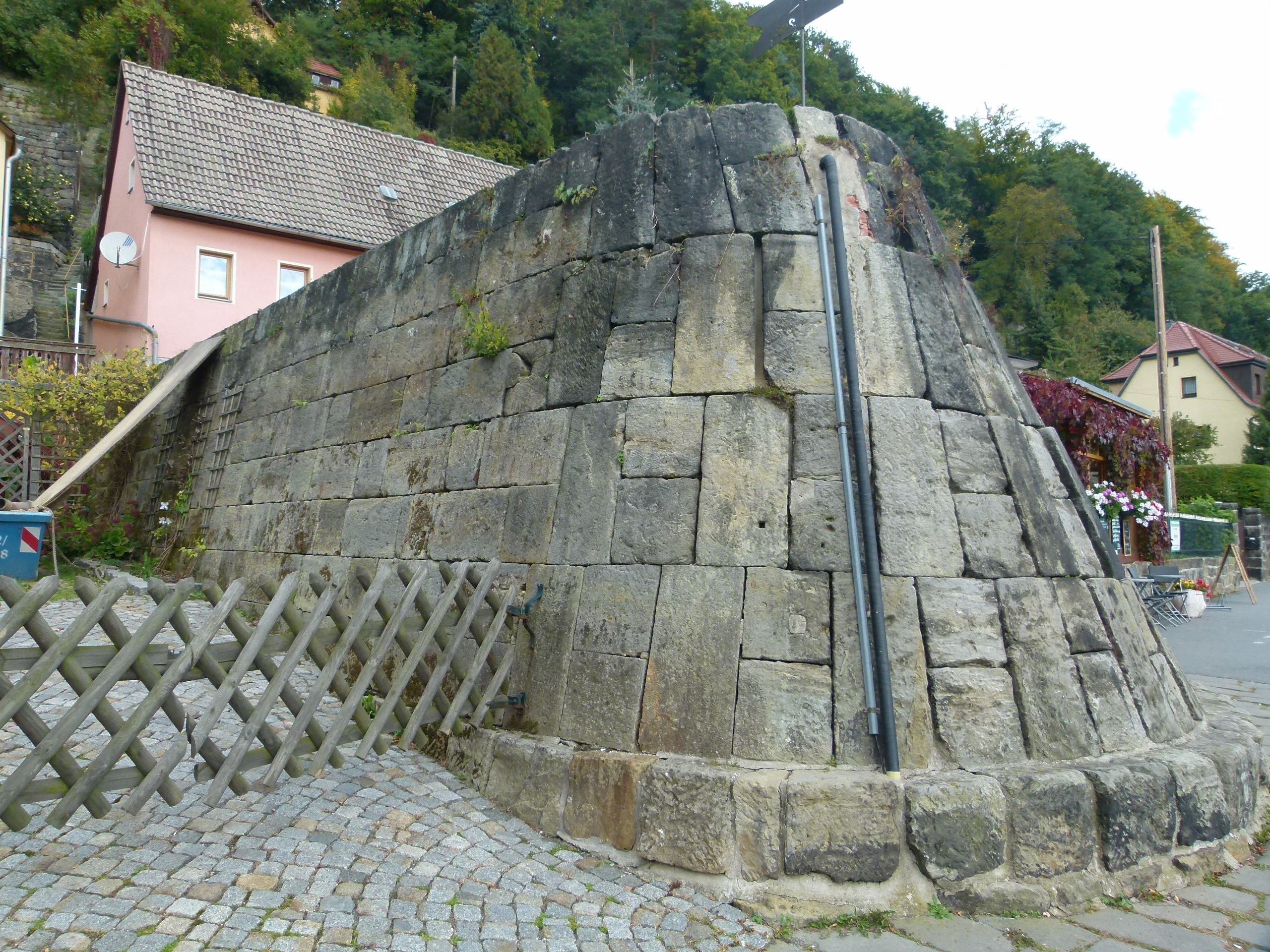 Habe - Künstlich errichtete Bollwerke zum Schutz der Bauwerke vor Eisgängen und Hochwasser der Elbe, Mennickestraße 15, Stadt Wehlen, Sachsen